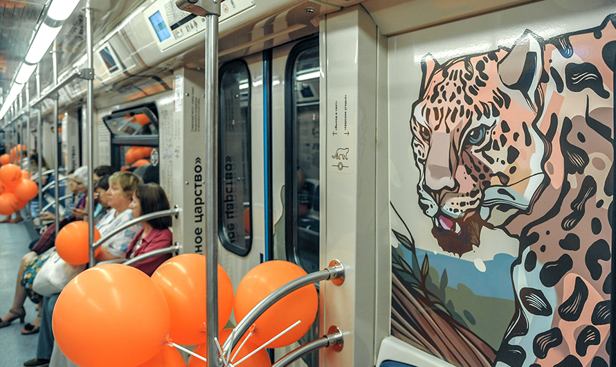 Изображение леопарда в салоне электропоезда метро 81-760/761 "Полосатый экспресс-2"